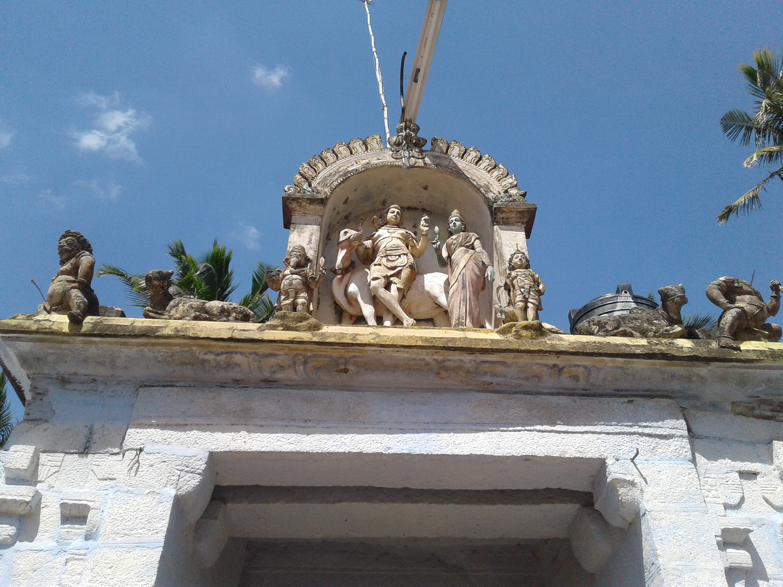 வாலீசுவரர் கோயில் அயிலூர்